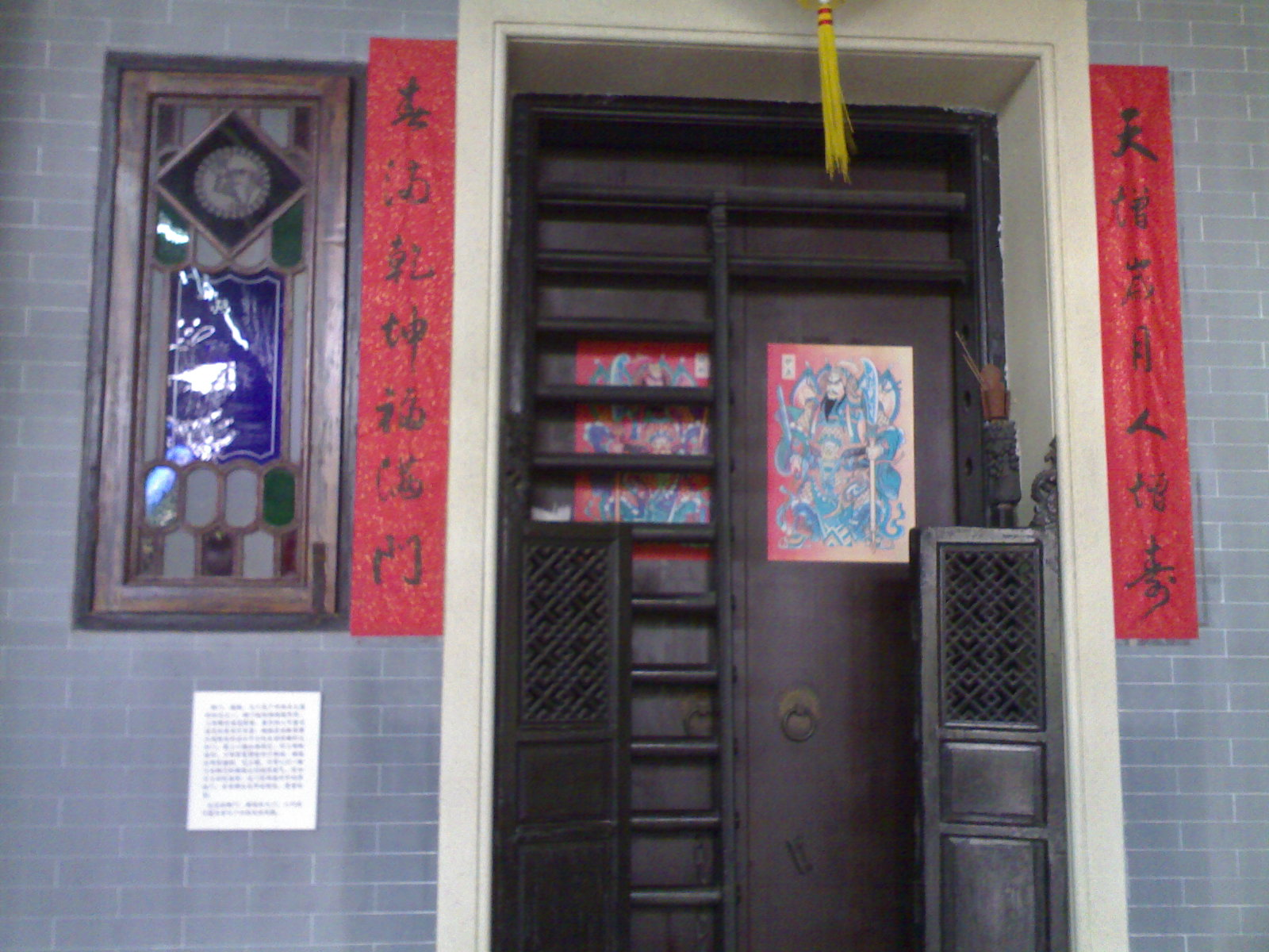 西关大屋的大门